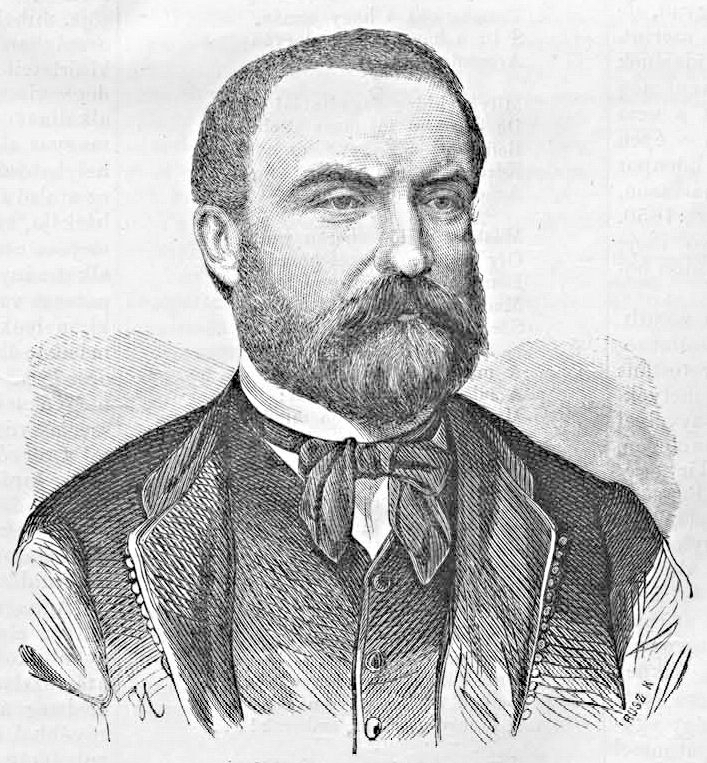 Szontagh Pál (1820–1904) politikus. Rusz Károly metszete (Vasárnapi Ujság, 1868. január 26.)